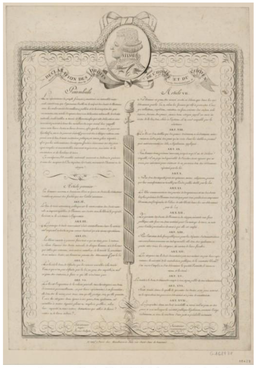 Manuscrit. Declaration des droits de l'homme et du citoyen : décrétés par l'Assemblée nationale, dans les séances, des 20, 21, 25 et 26 aout 1789, sanctionnés par le roi : [estampe] / Saint Omer scripsit ; James sculpsit